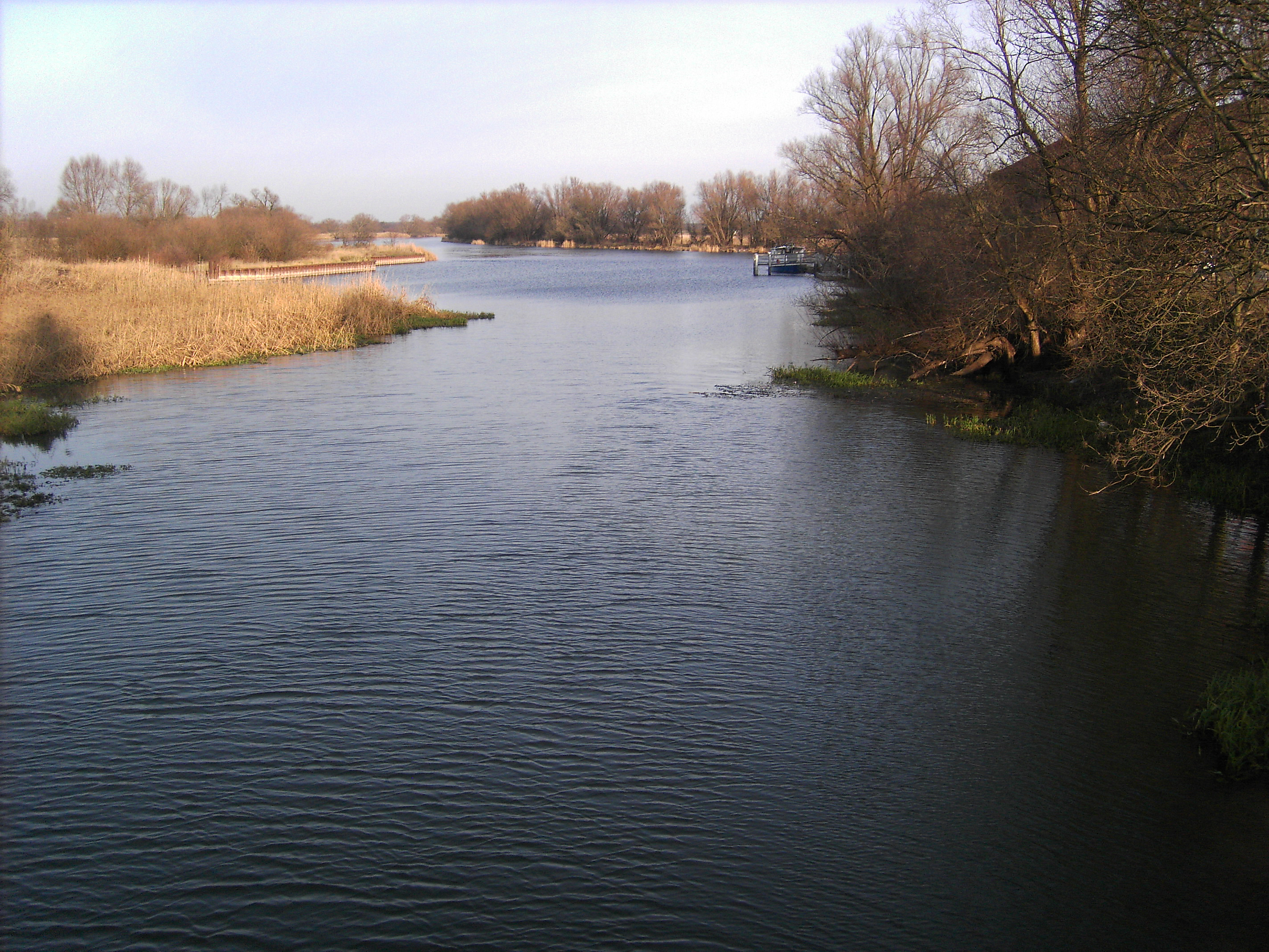 Stremme im Bereich der Mündung in die Havel, bei Milow. Rechts das Besucherzentrum Naturpark Westhavelland